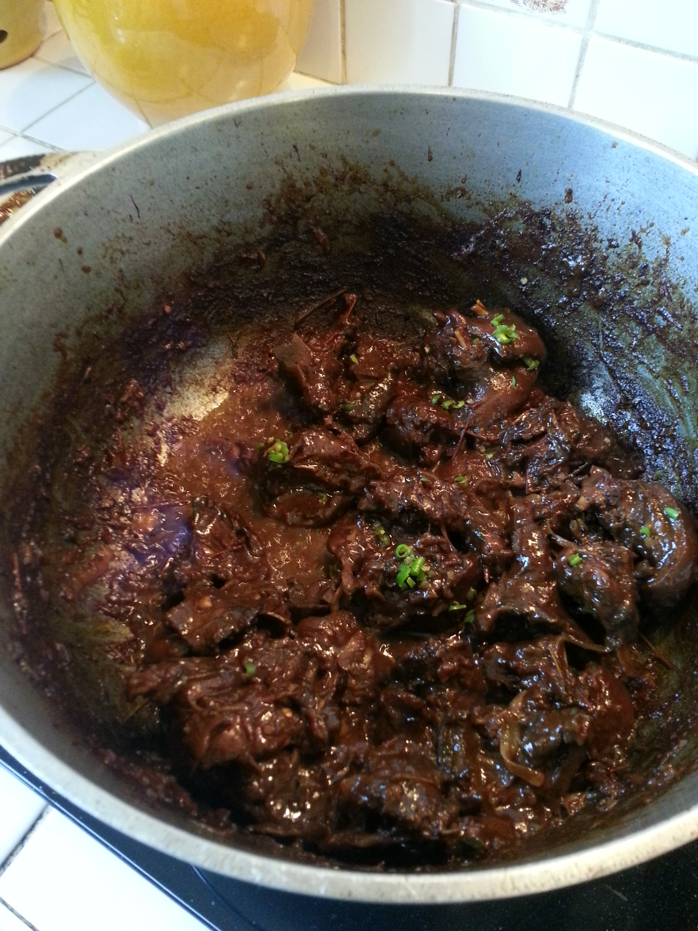 Civet tangue This is an image of food from Réunion